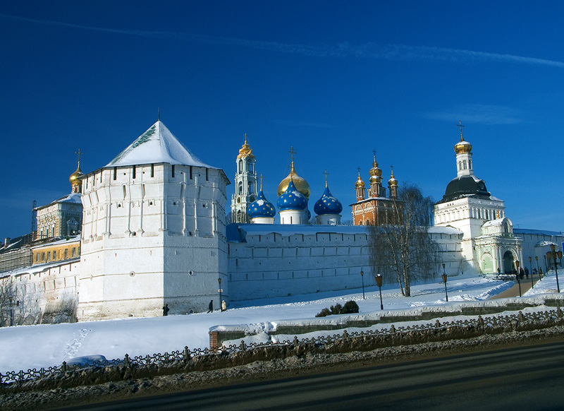 Ансамбль Троице-Сергиевской Лавры (Москва и Московская область, Сергиев Посад, Троице-Сергиева Лавра)